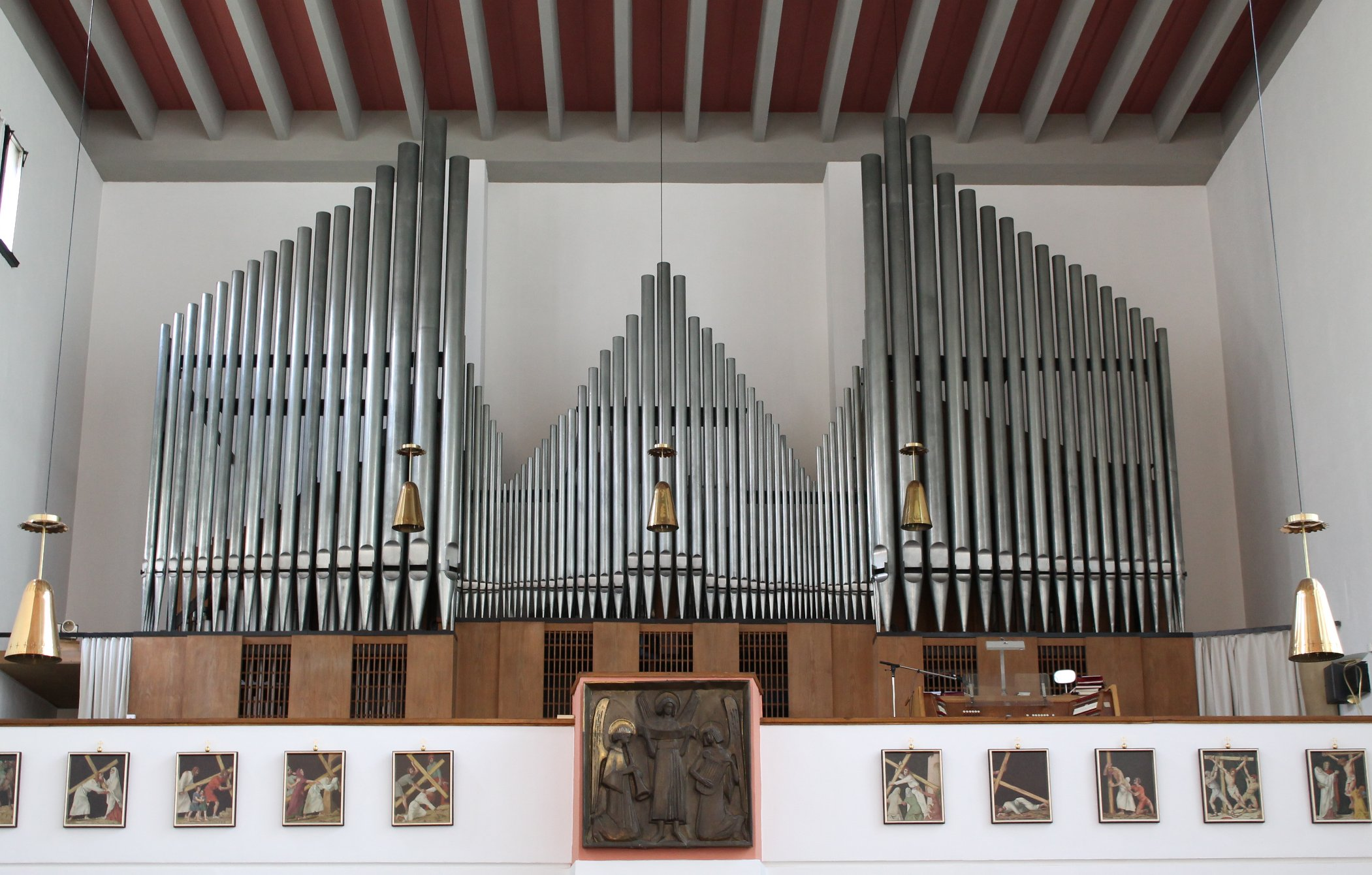 Orgel von St. Andreas in München (ca. 1955, Albert Moser)